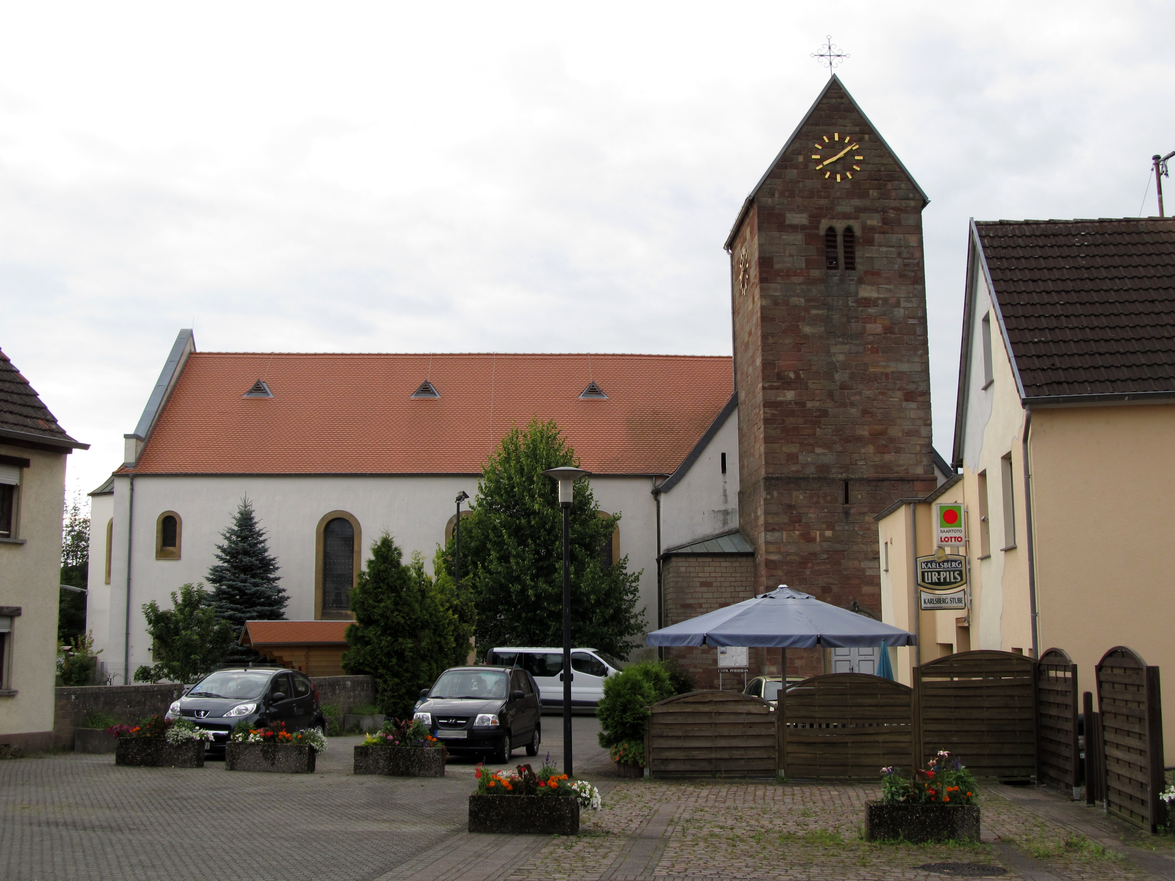 Die katholische Pfarrkirche St. Barbara in Blickweiler, Saarland